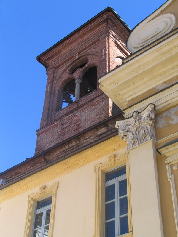 Asti, Chiesa di San Martino.Foto fatta da me faberh 2006